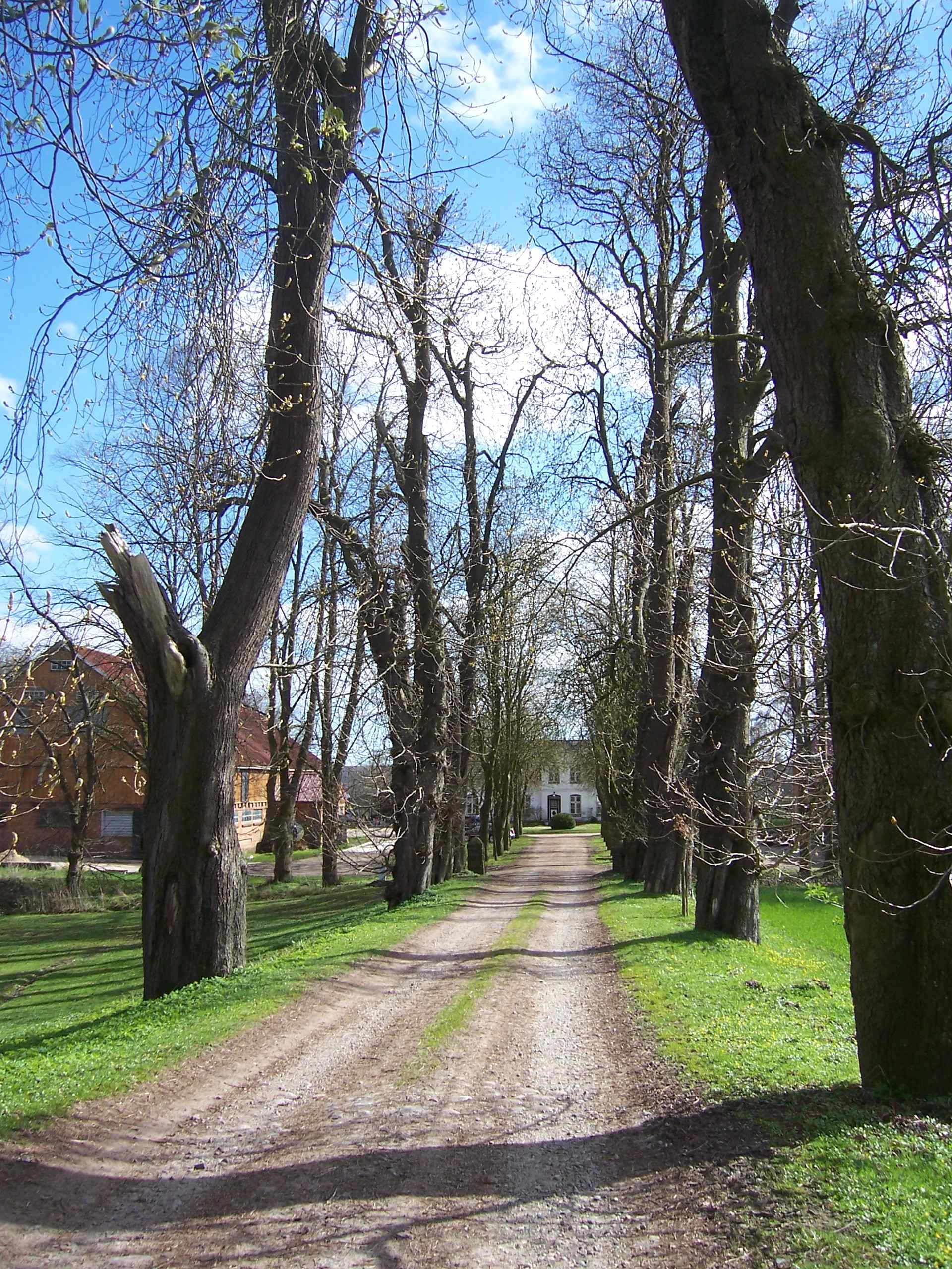 Hoffnungsthal